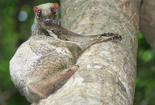 Dermoptère, Colugo